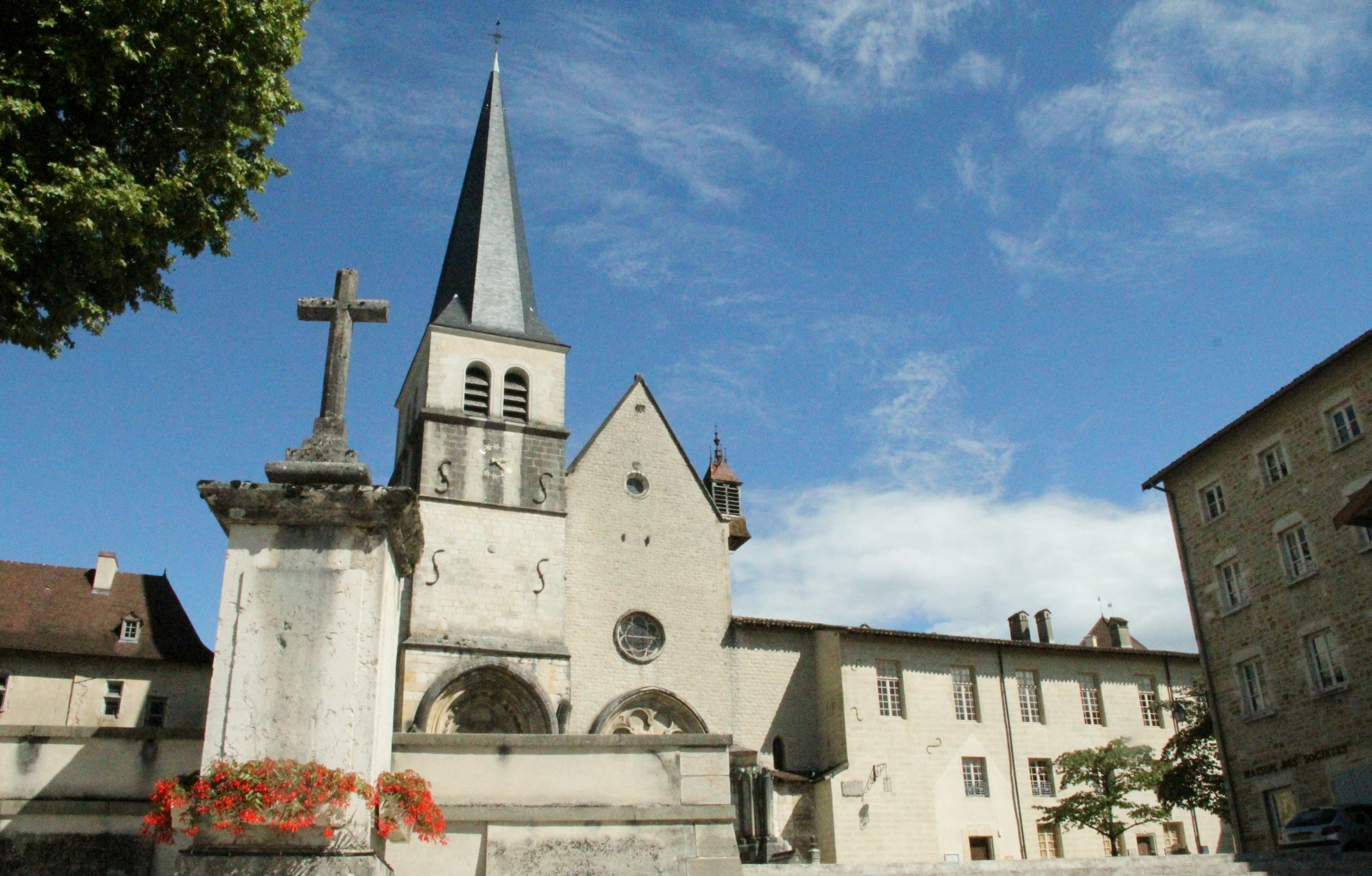 vue du village This building is en partie classé, en partie inscrit au titre des Monuments Historiques. .